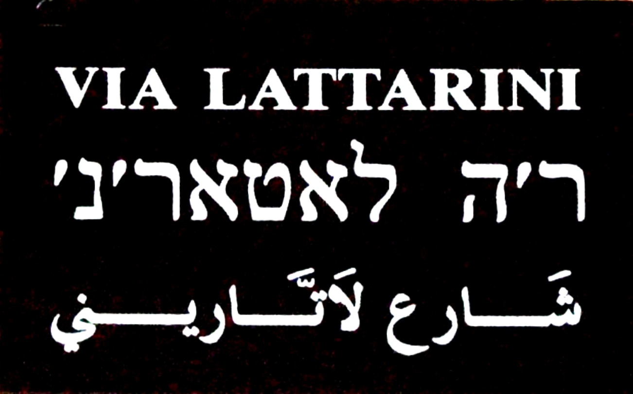 Targa trilingue (italiano, ebraico, arabo) dei Lattarini, dall'arabo suk-al-Attarin, cioè "mercato dei droghieri" o/e anche "dei profumieri".